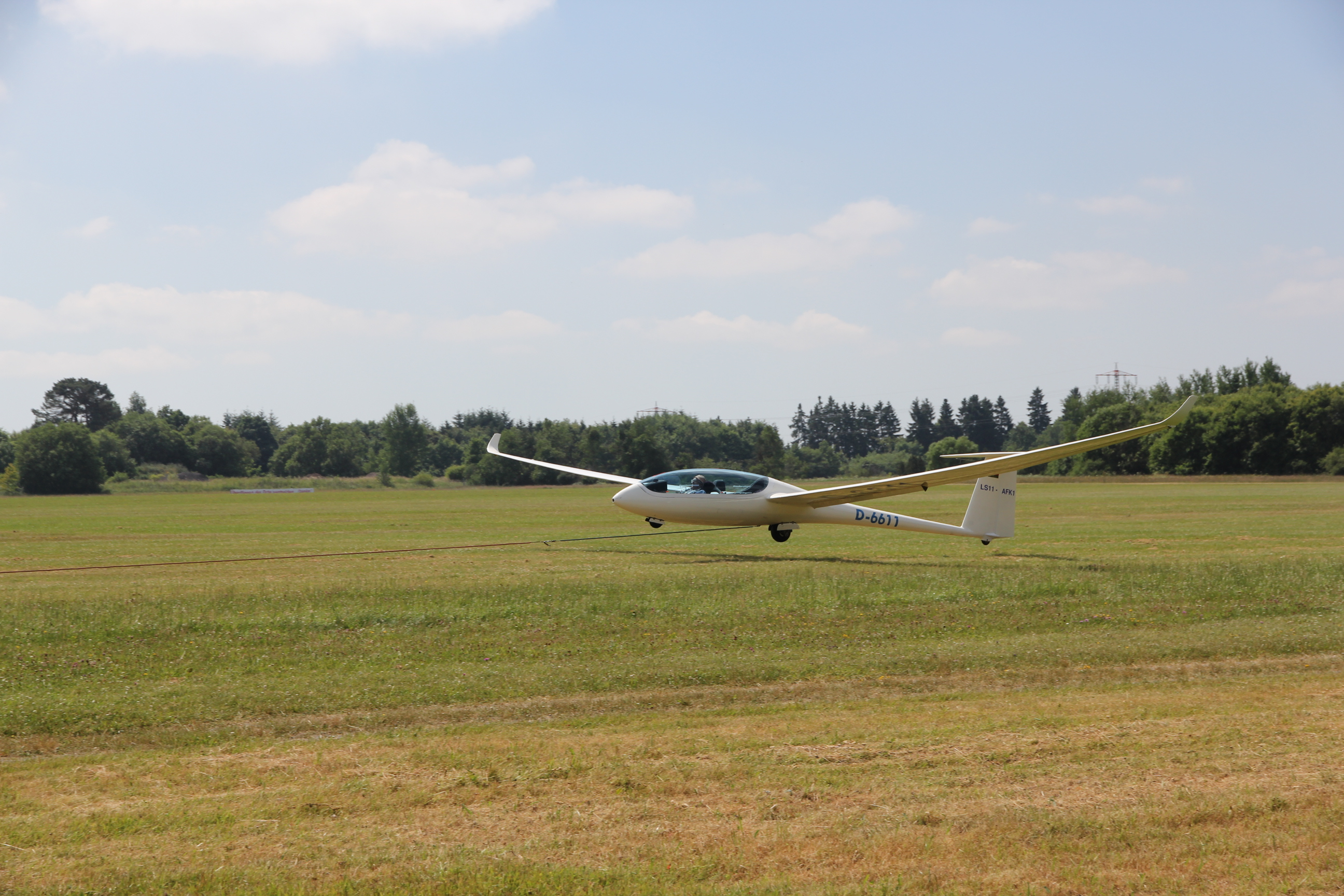 Akaflieg Köln LS11 - AFK1 Windenstart1